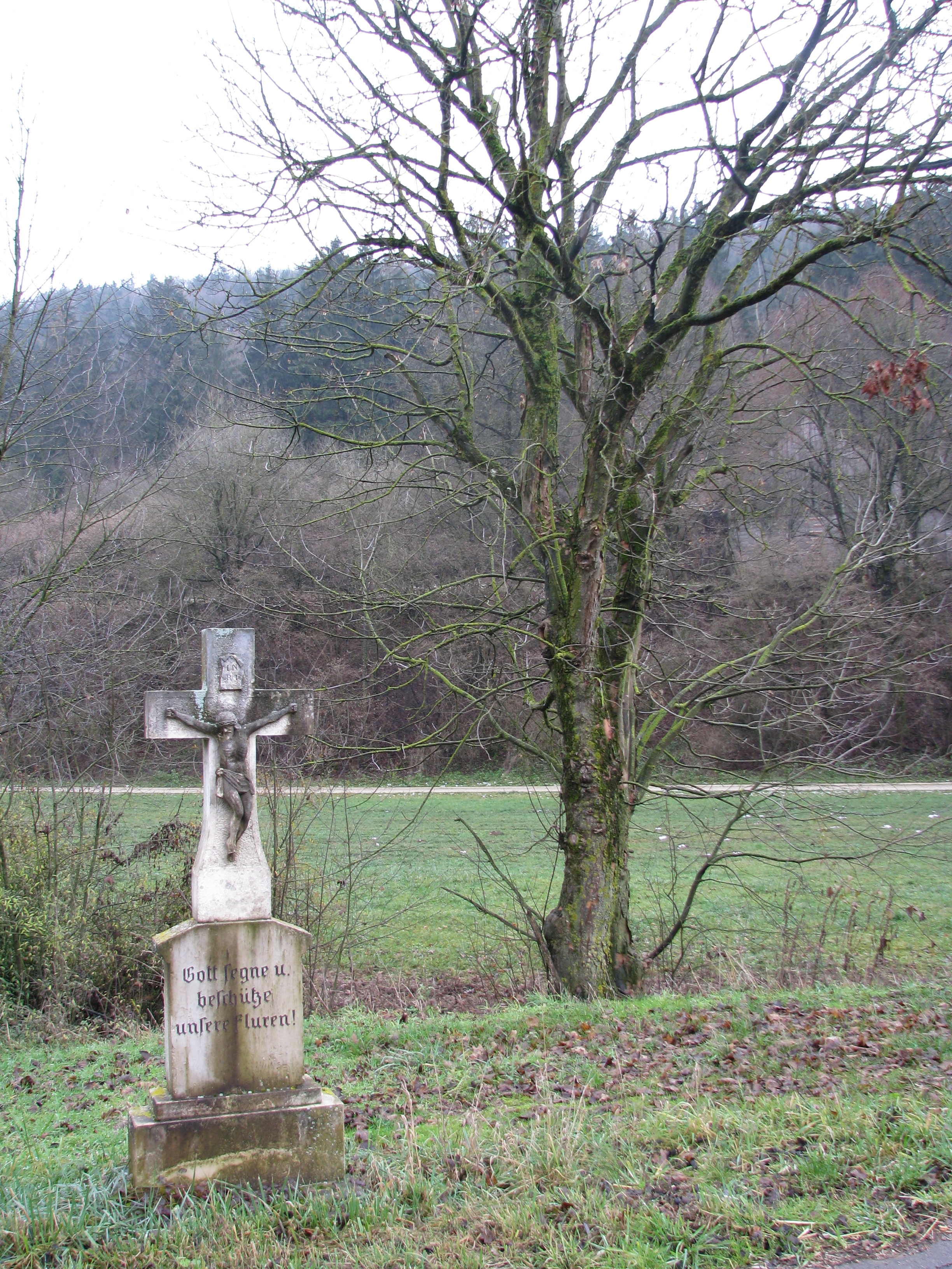 Heimbach, Ortsteil von Greding im mittelfränkischen Landkreis Roth in Bayern, Kreuz am Heimbacher Bildstockweg